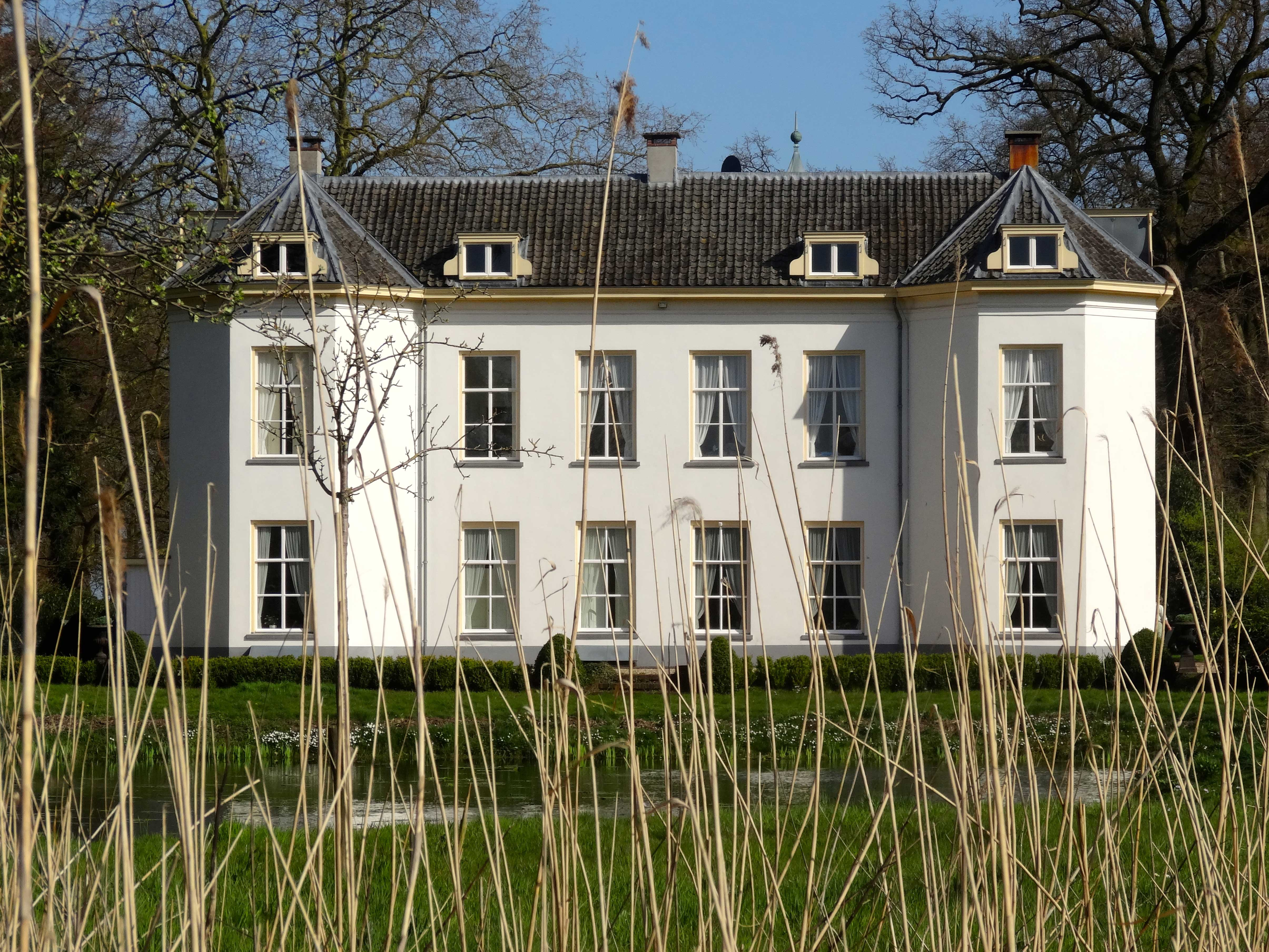 Achterzijde Huis Den Bosch in Leuvenheim